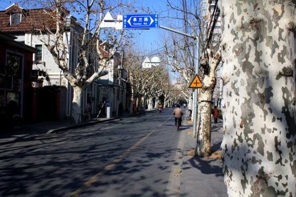 Shanghai, siehe [1]